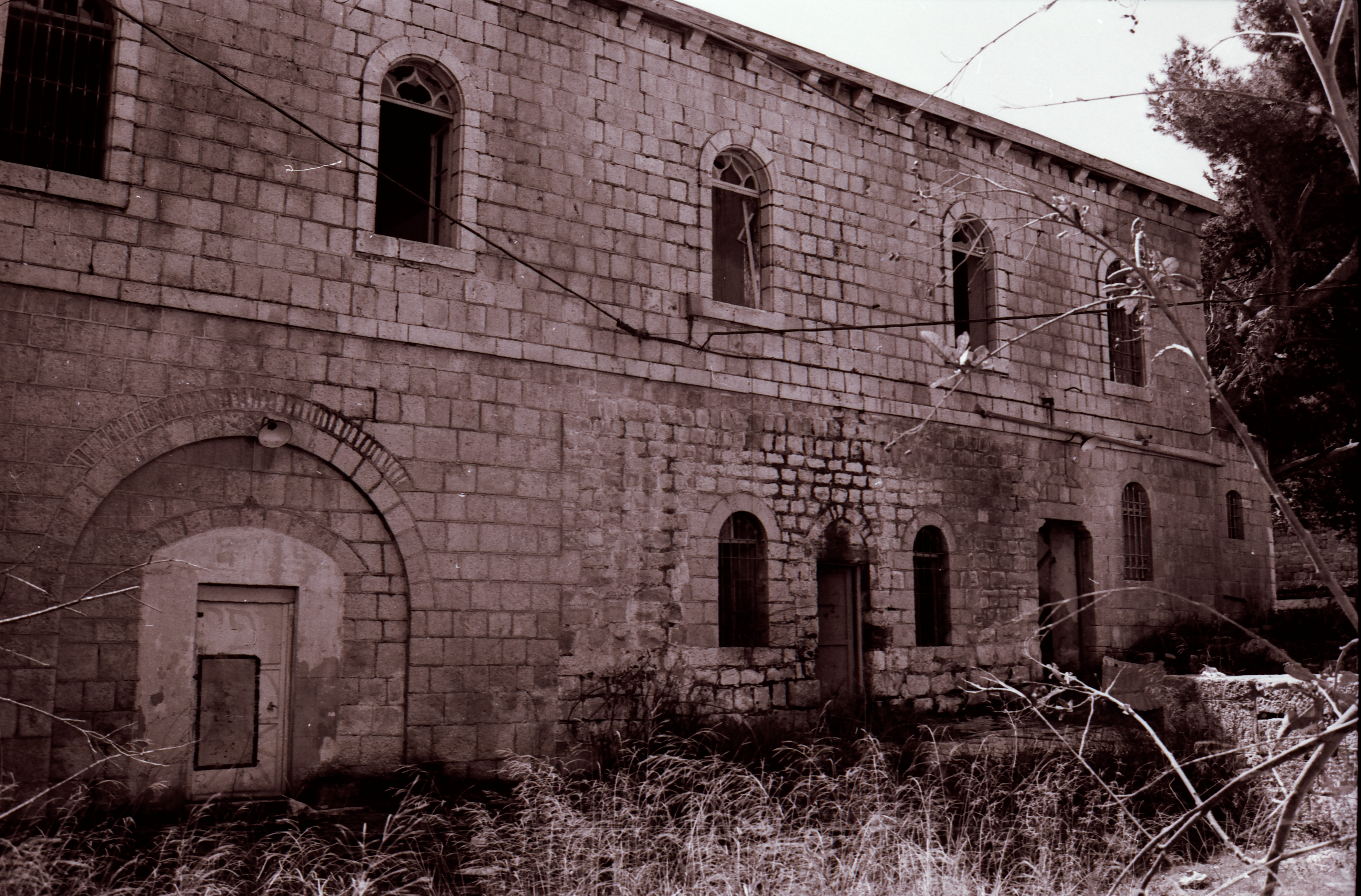 פנים בית הכנסת של ראשוני החסידים בטבריה